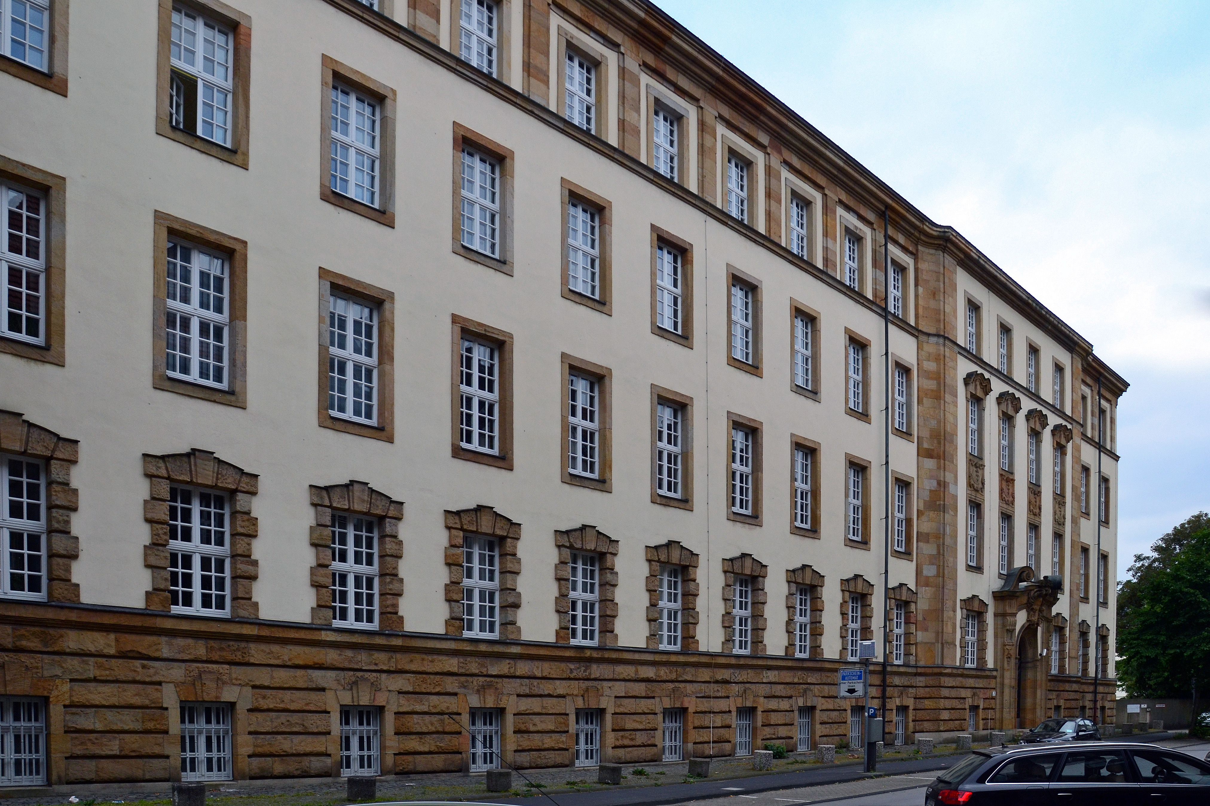 Altes Amts- und Landgericht Essen in Essen-Rüttenscheid, fertiggestellt 1913